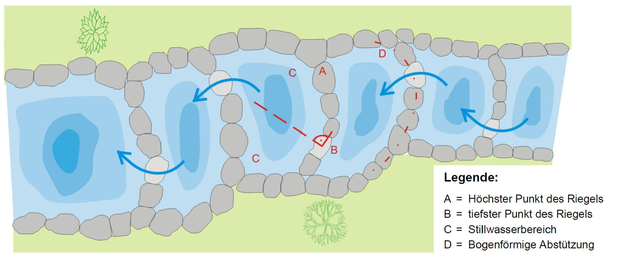 Représentation schématique d’une rampe pendulaire lors d’un débit d’eau faible et moyen